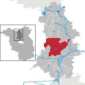 Löwenberger Land in Brandenburg (Country) - District Oberhavel